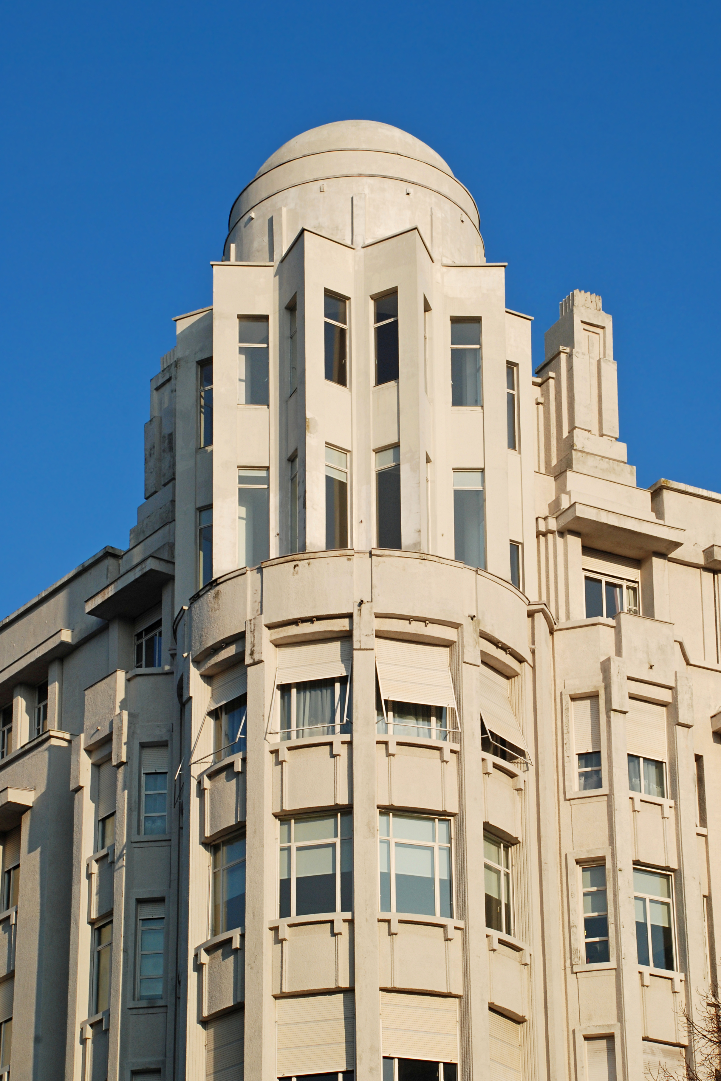 Belgique - Bruxelles - Palais de la Folle Chanson (Art déco - Antoine Courtens - 1928)